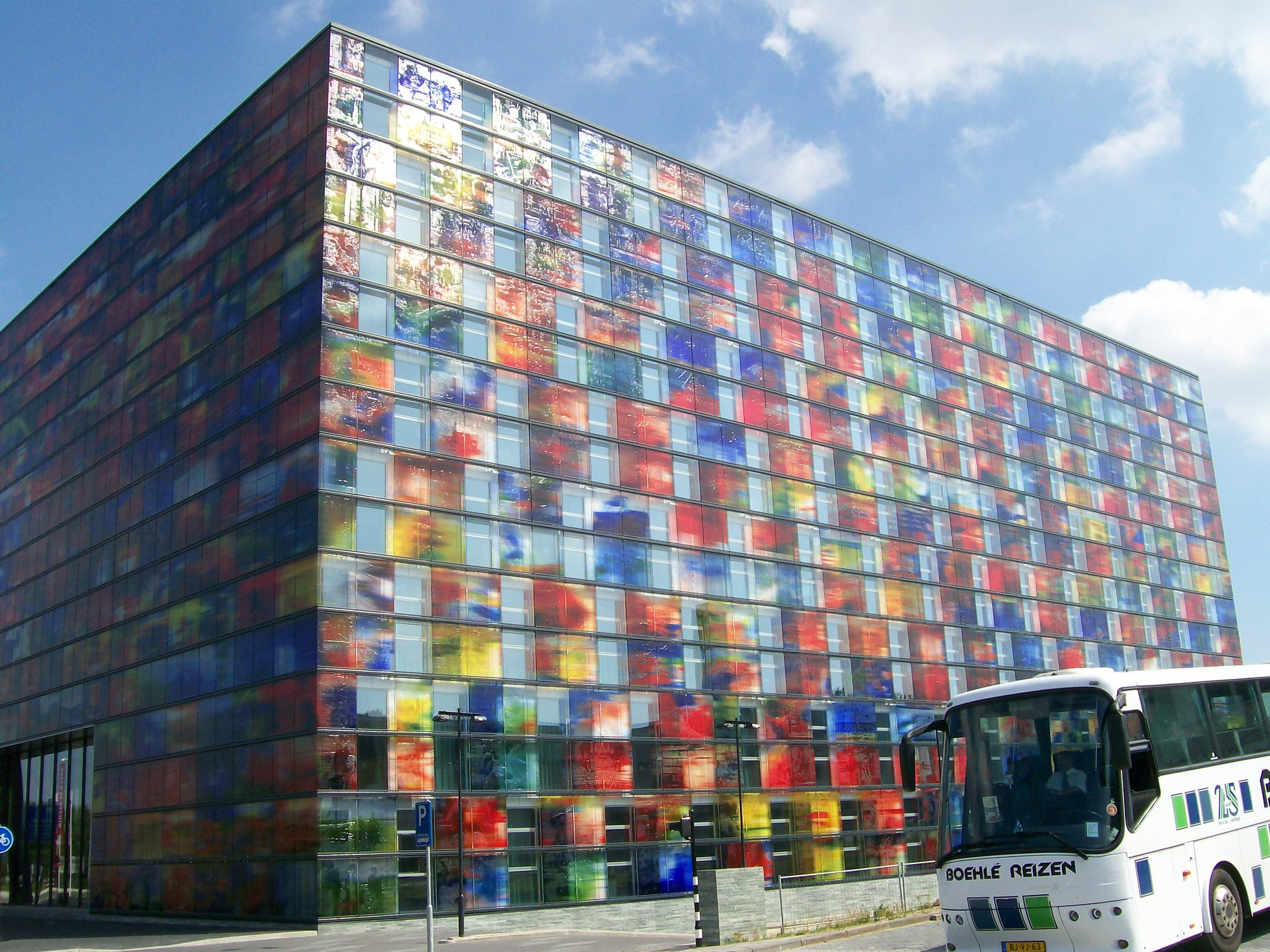 Zijkant van het gebouw Beeld en Geluid